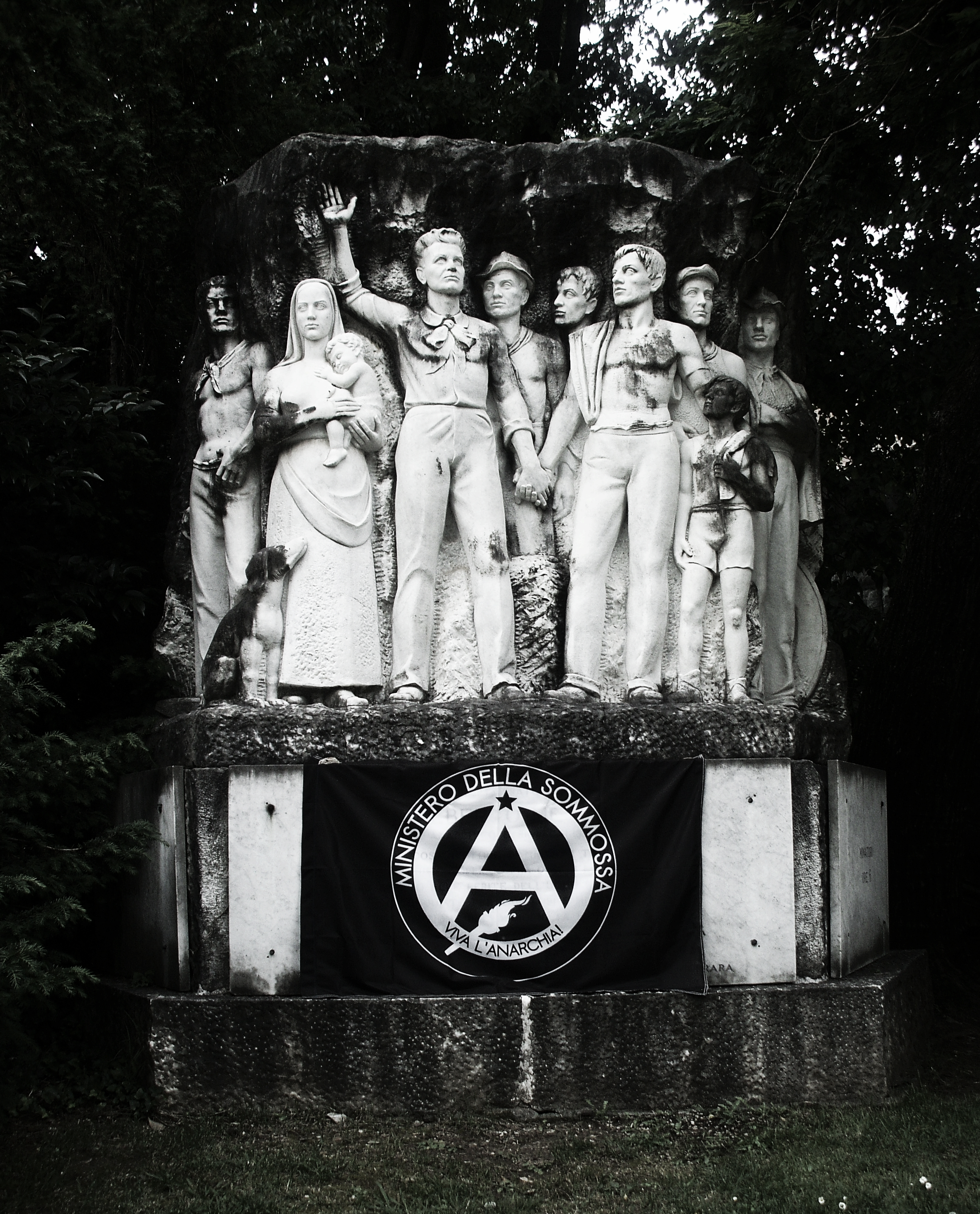 Il monumento con il titolo "Cararia", nome latino di Carrara, raffigura al centro della scultura Alberto Meschi, in fraterno e fermo atteggiamento di difesa di un gruppo di cavatori, accompagnati da dei bambini e una donna che circondano il leader sindacale. Al fianchi dell'iscrizione, le conquiste migliorative dell'orario di lavoro ottenute dalla Camera del lavoro di Carrara sotto la guida di A. Meschi: cavatori ore 6/5; minatori ore 6.